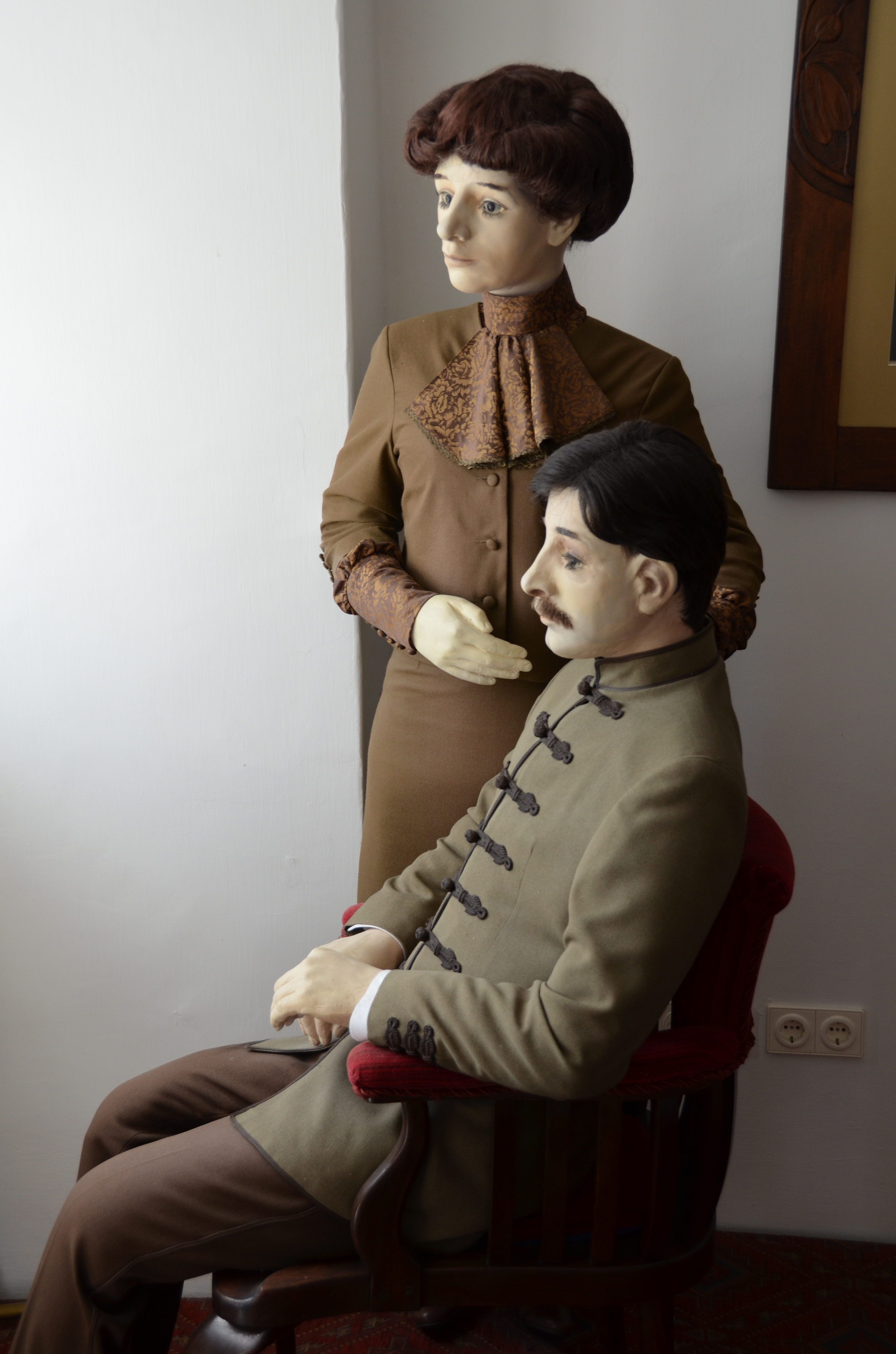 Carles I d'Àustria i IV d'Hongria - Zita de Borbó-Parma - Tihany